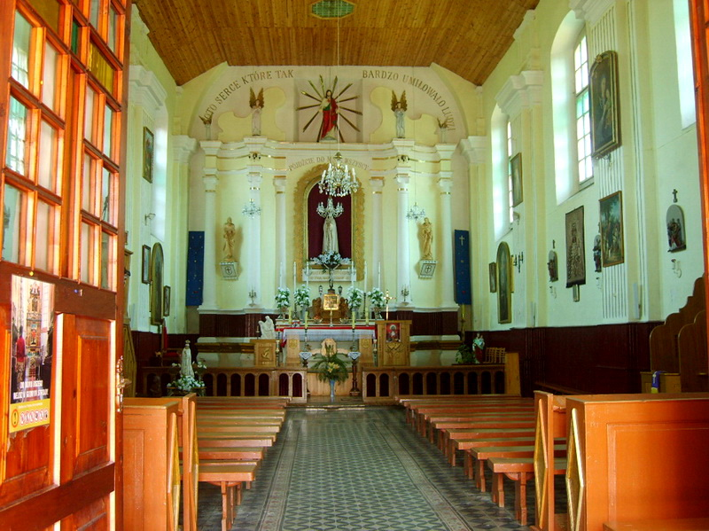 Касцяневічы. Інтэр'ер касцёла